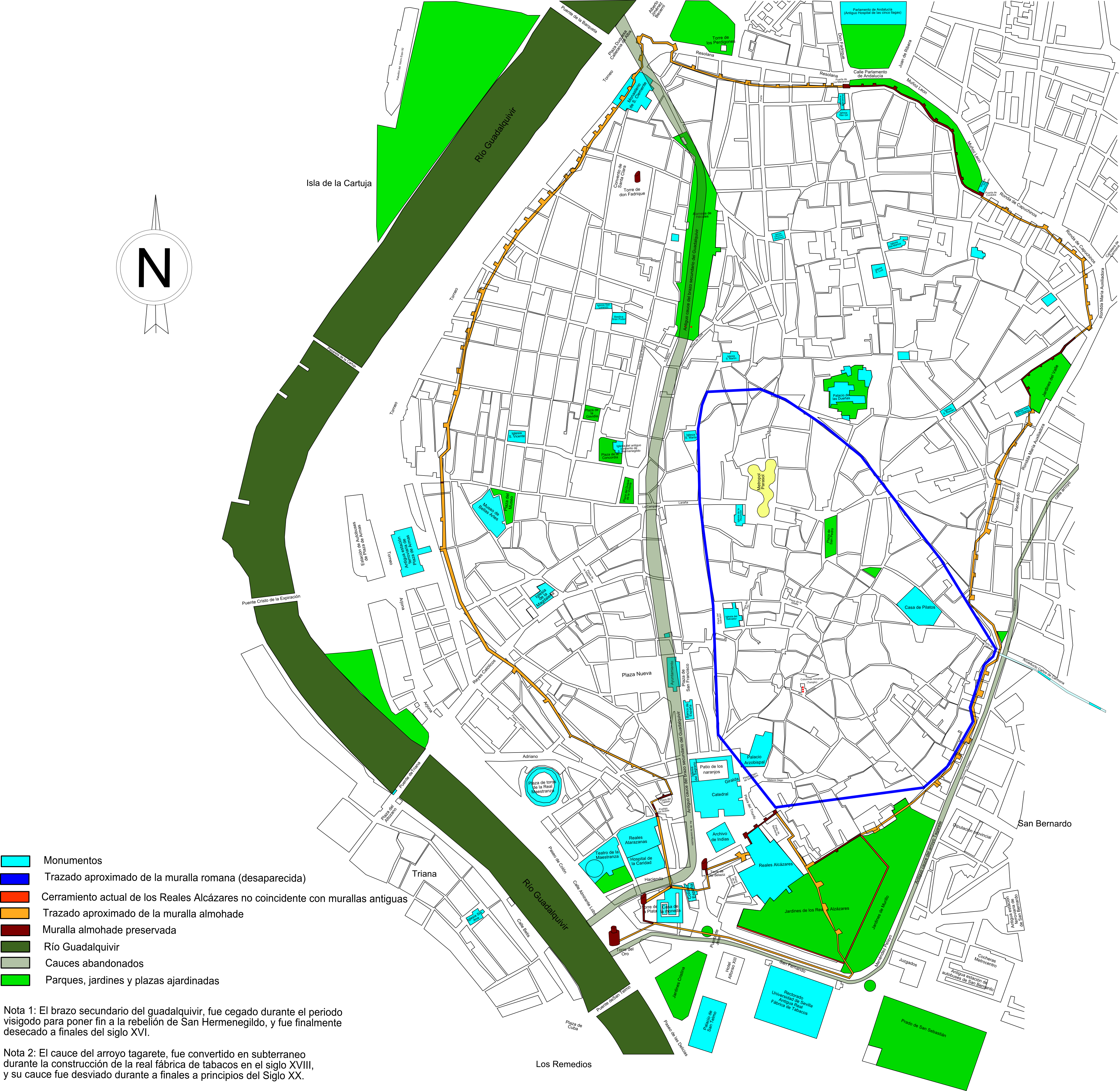 Plano de las murallas romanas y almohades de Sevilla (conservadas hasta mediados del Siglo XVIII), sobre callejero actual del centro de la ciudad, en el que también aparecen los cambios realizados en los cauces del Guadalquivir -brazo secundario cegado en época visigoda y desecado en el s XVI- y el Tagarete -"entubado" durante la construcción de la Real Fábrica de Tabacos y desviado en el Siglo XX-; se reflejan así mismo las zonas preservadas de la muralla Almohade, y del acueducto de los Caños de Carmona. Realizado por mi con Ink Scape